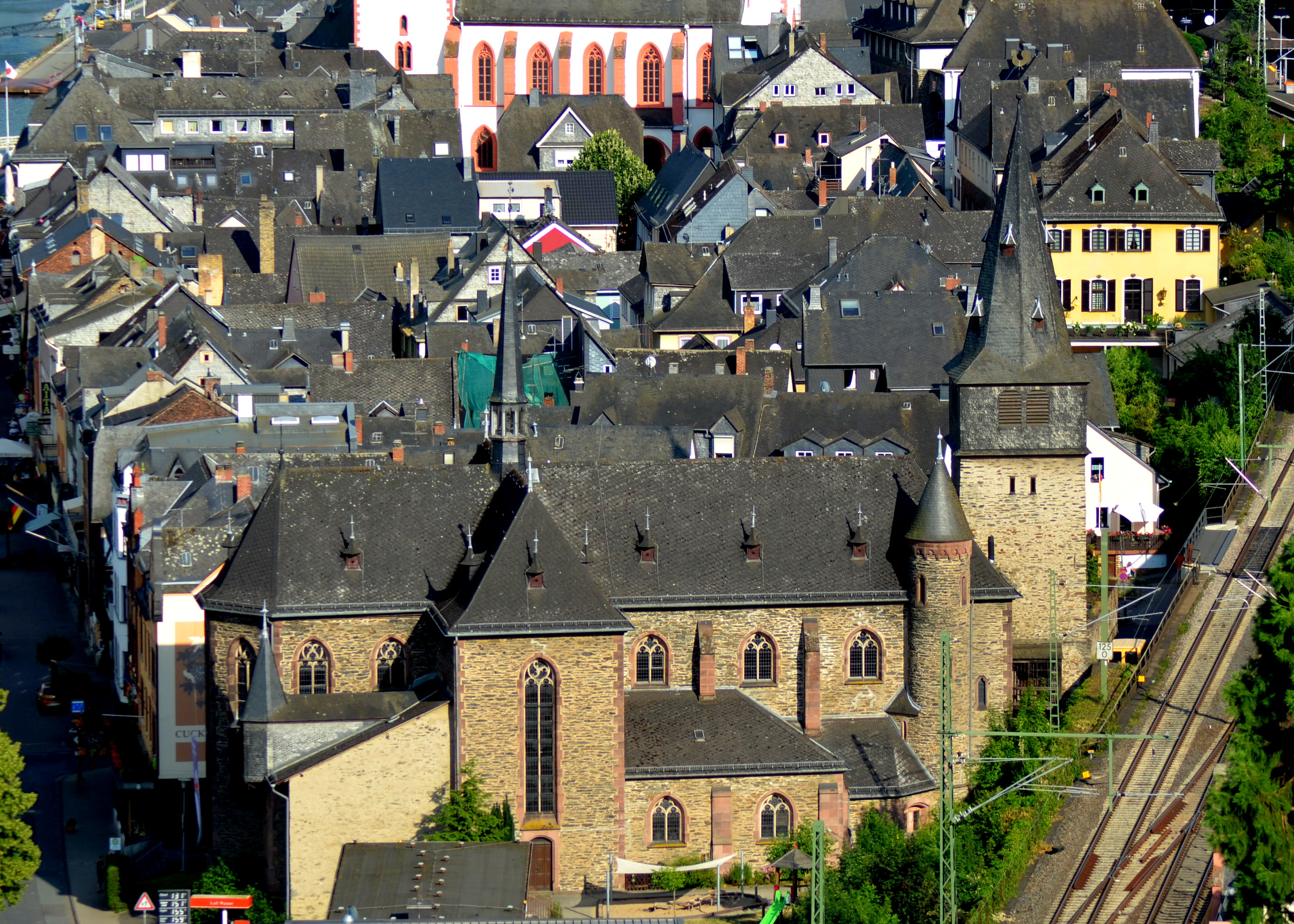 Katholieke kerk van St. Goar